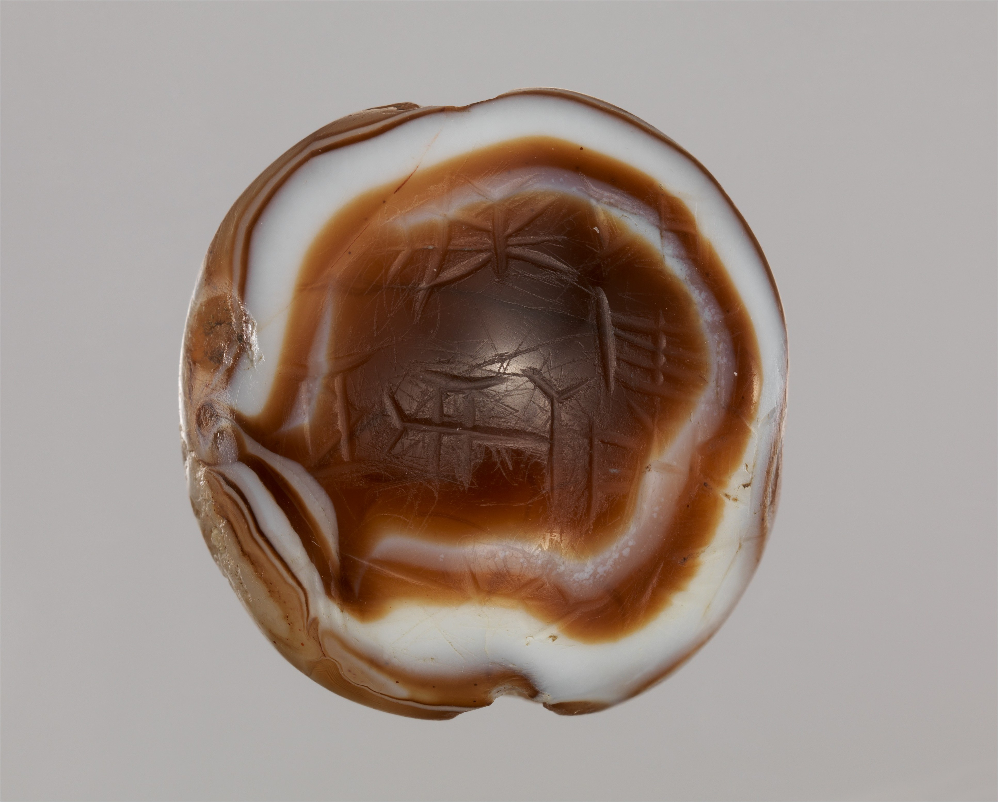 Kassite; Bead; Stone-Ornaments-Inscribed